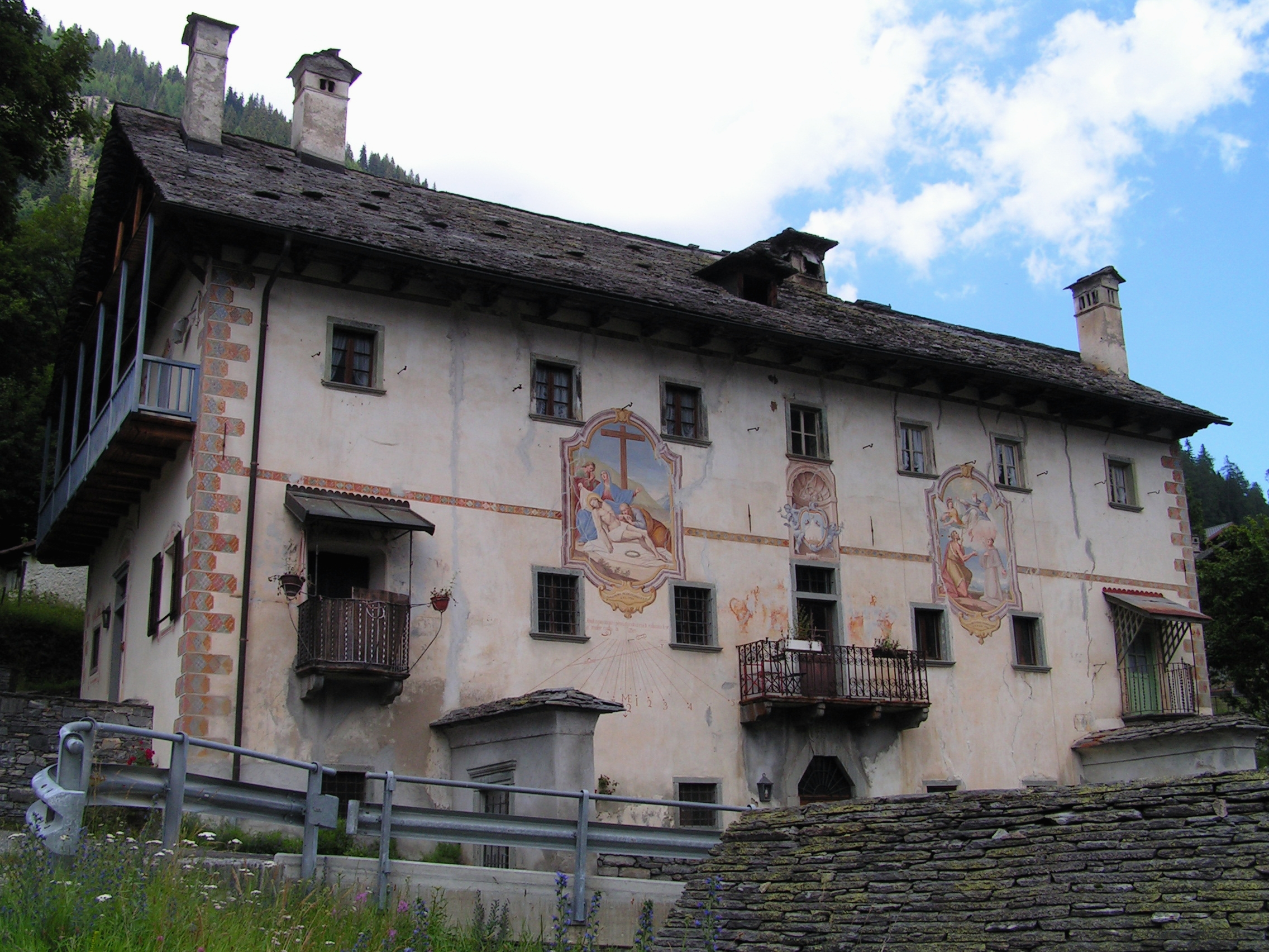 Campo Vallemaggia. La maison Pedrazzini «ad Fontem».